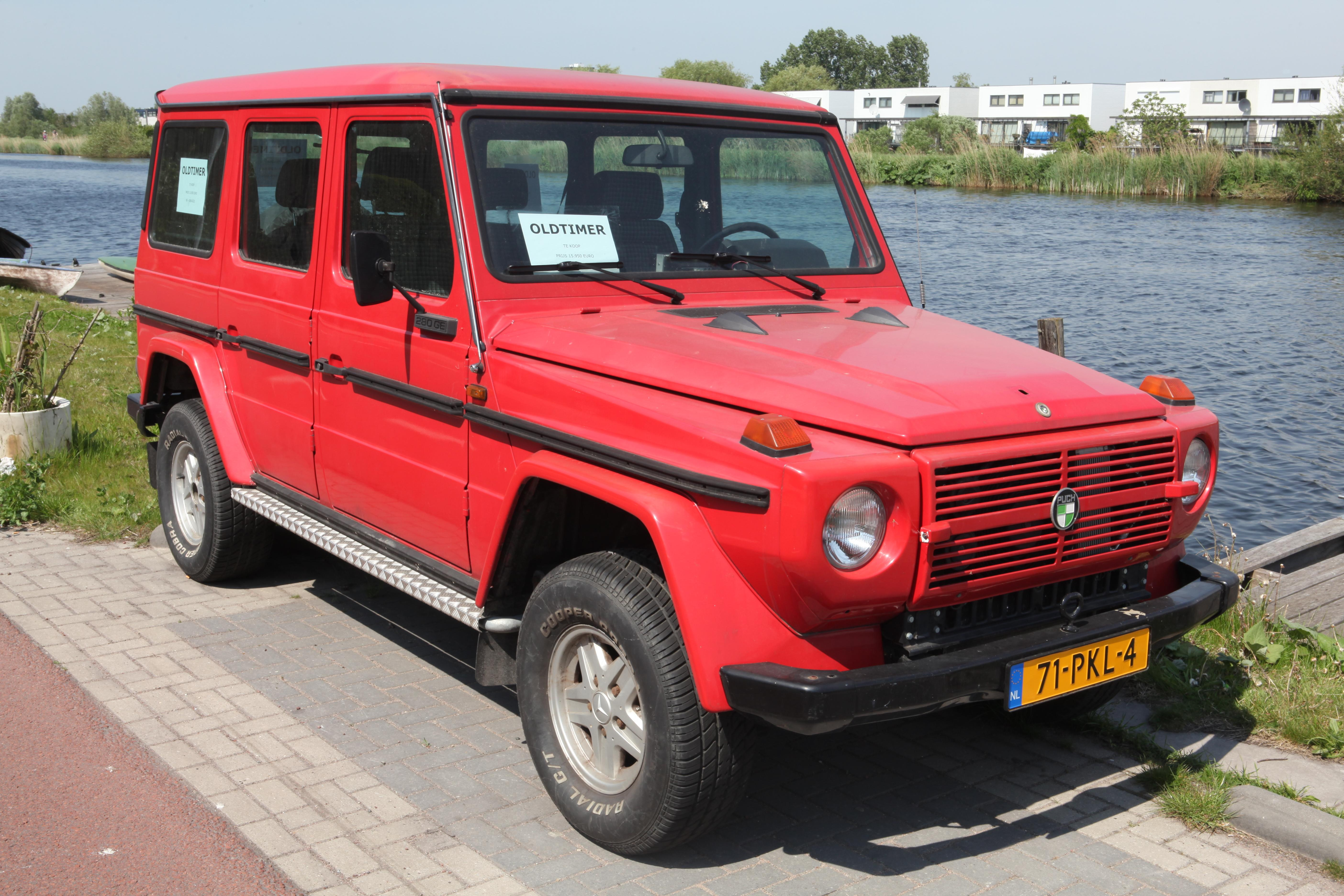 Steyr Daimler Puch 280 GE